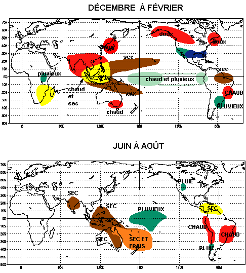 Impacts sur le climat mondial des épisodes de El Nino